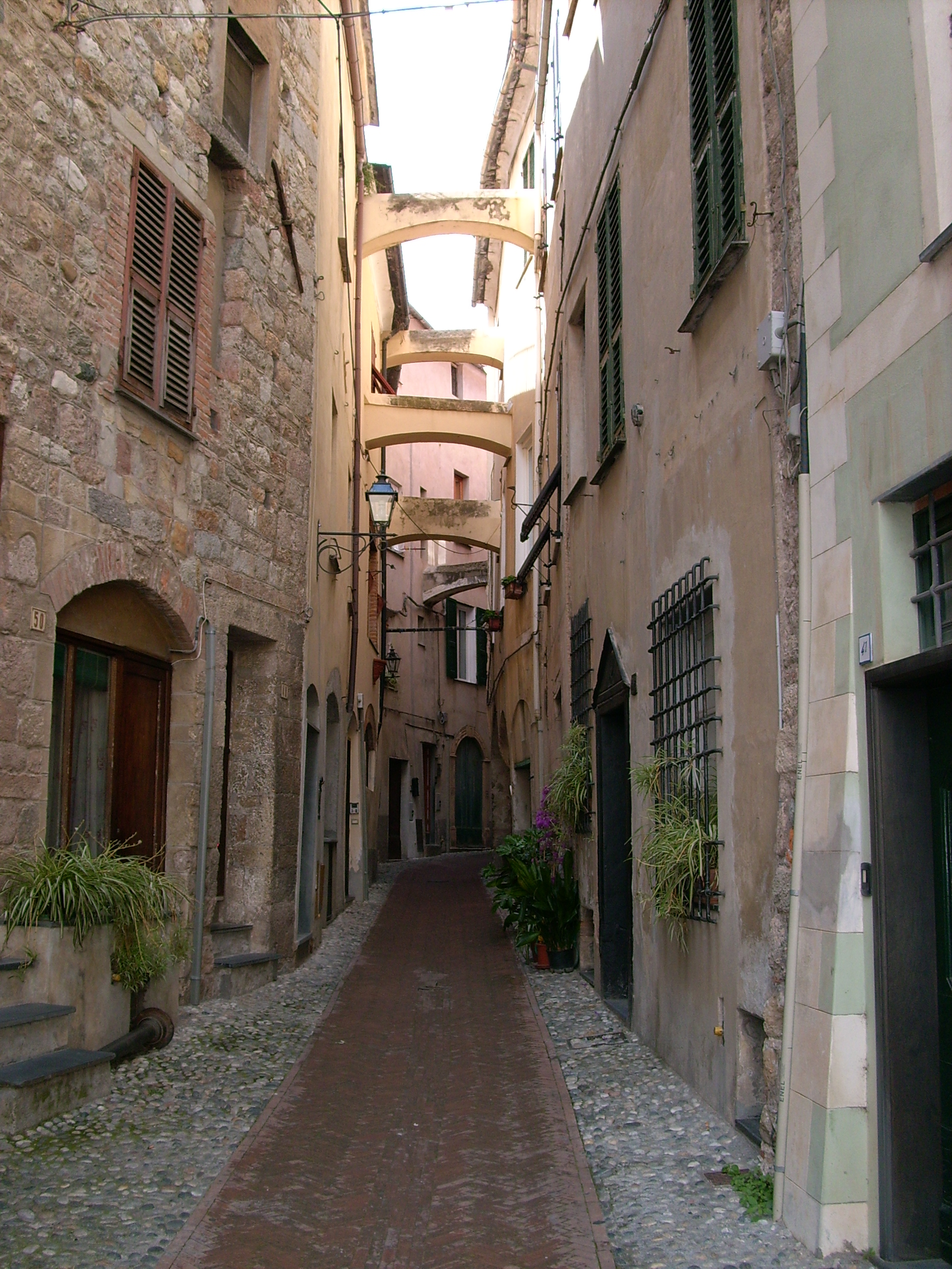 Grotta della Basura presso Toirano, Liguria, Italia